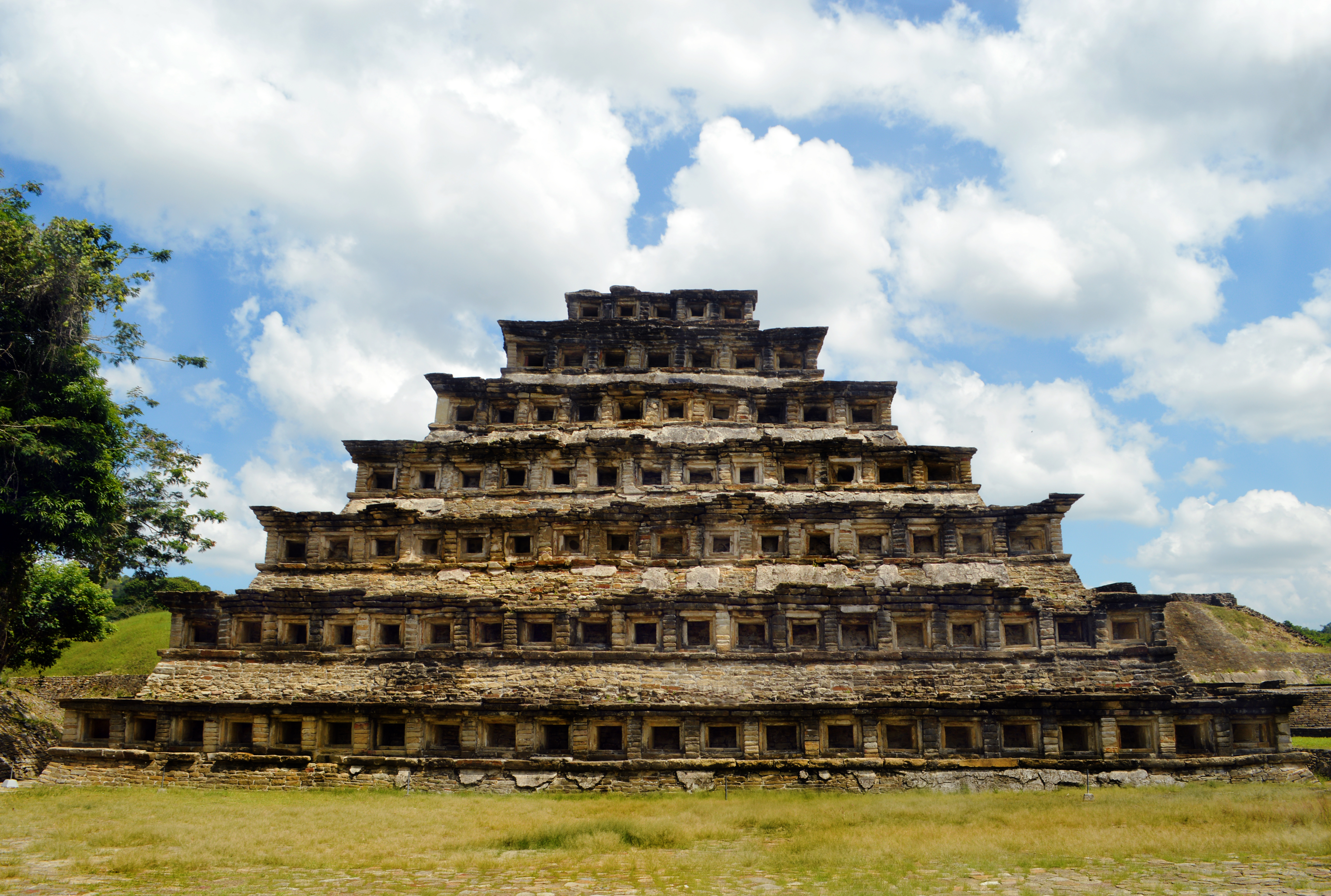 Vista trasera de la Pirámide de Los Nichos en la Ciudad Prehispánica de El Tajín, en Papantla, Veracruz